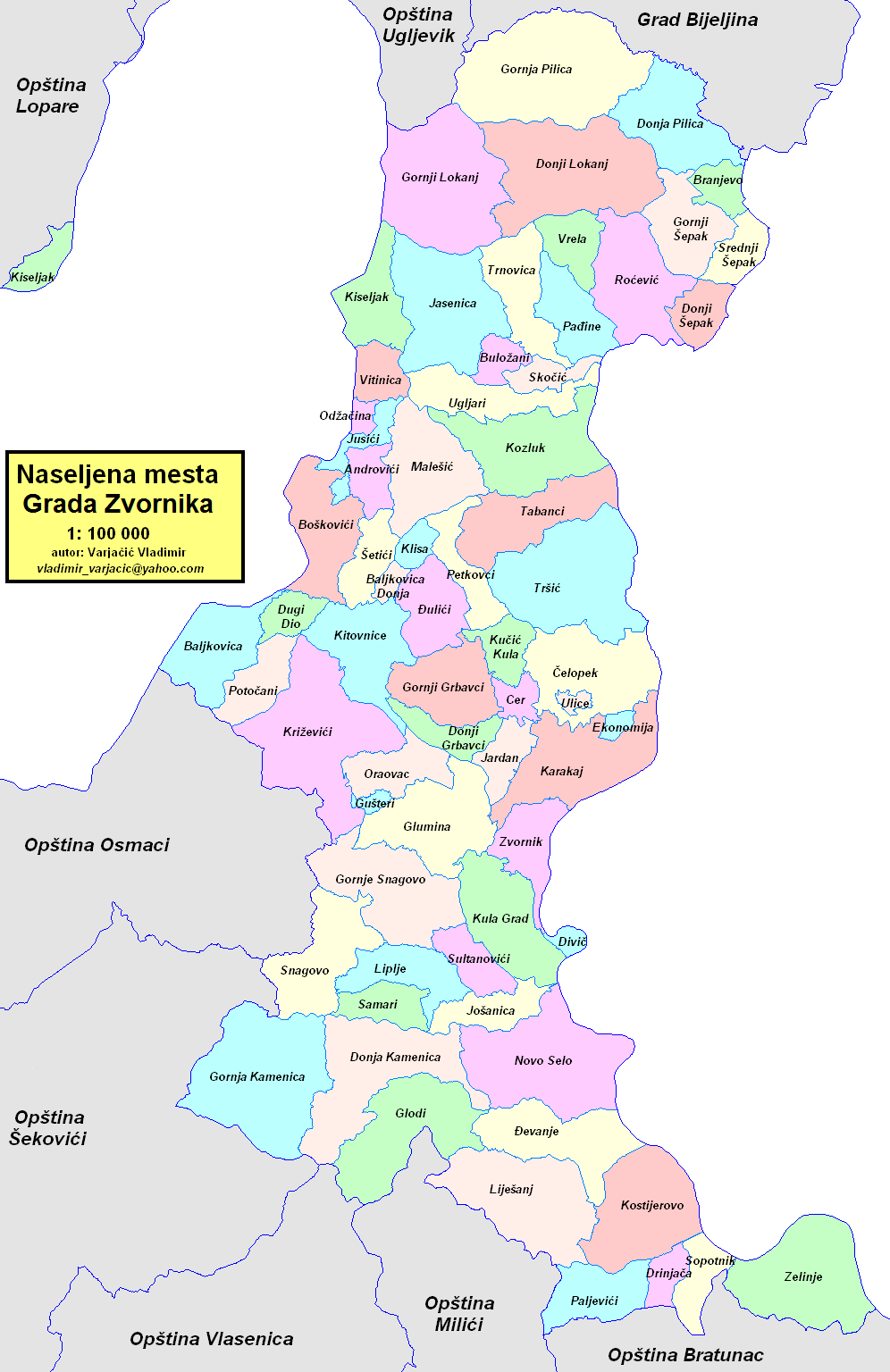 Grad Zvornik